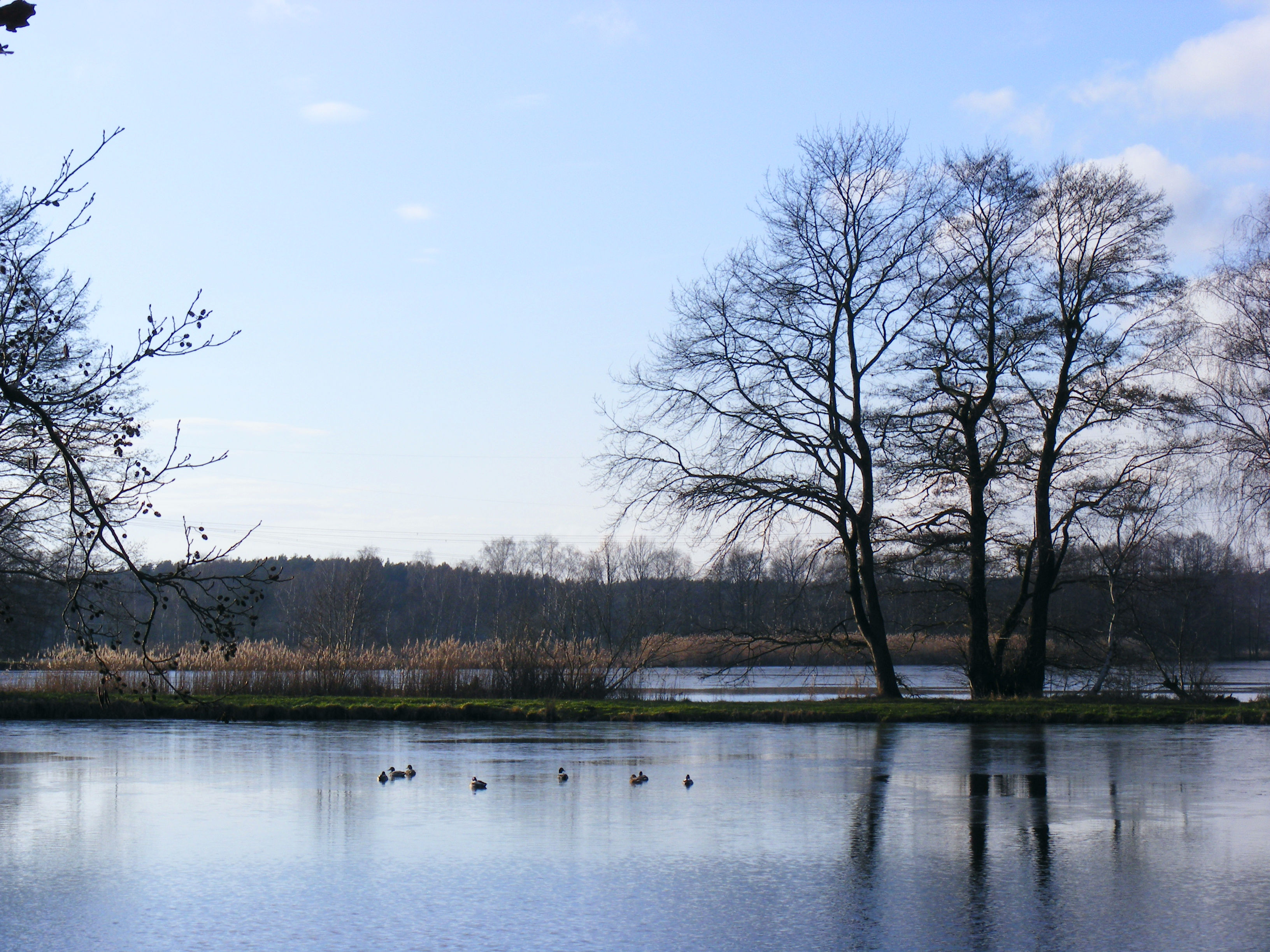 Enten im Eis des Teiches